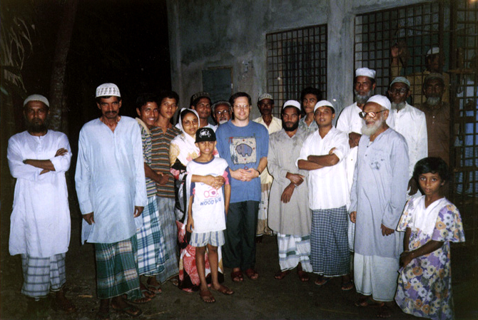 Mosque